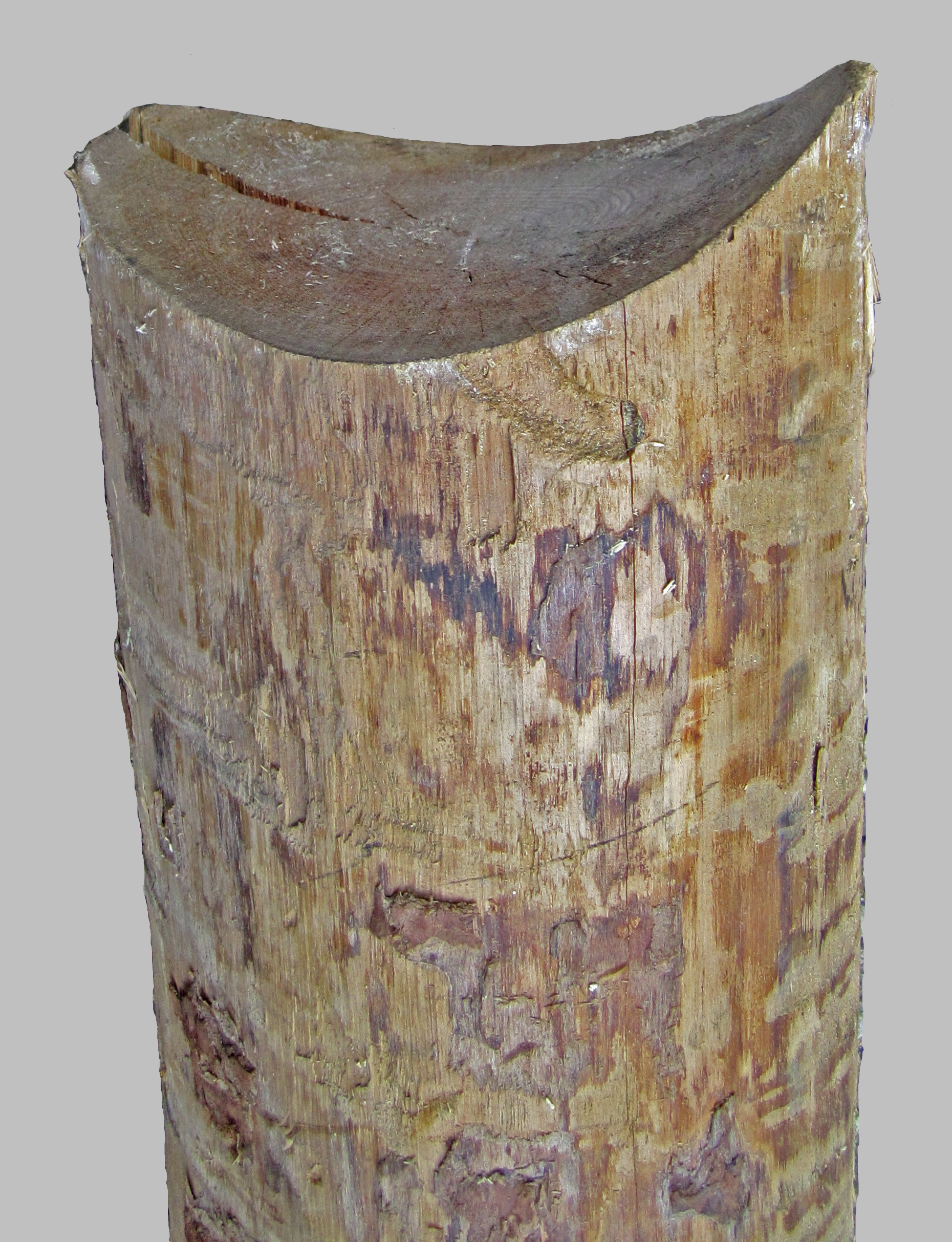 Stempel mit Schar für einen polnischen Türstock.